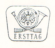 Österreichischer Ersttags-Zusatzstempel-1973-1976